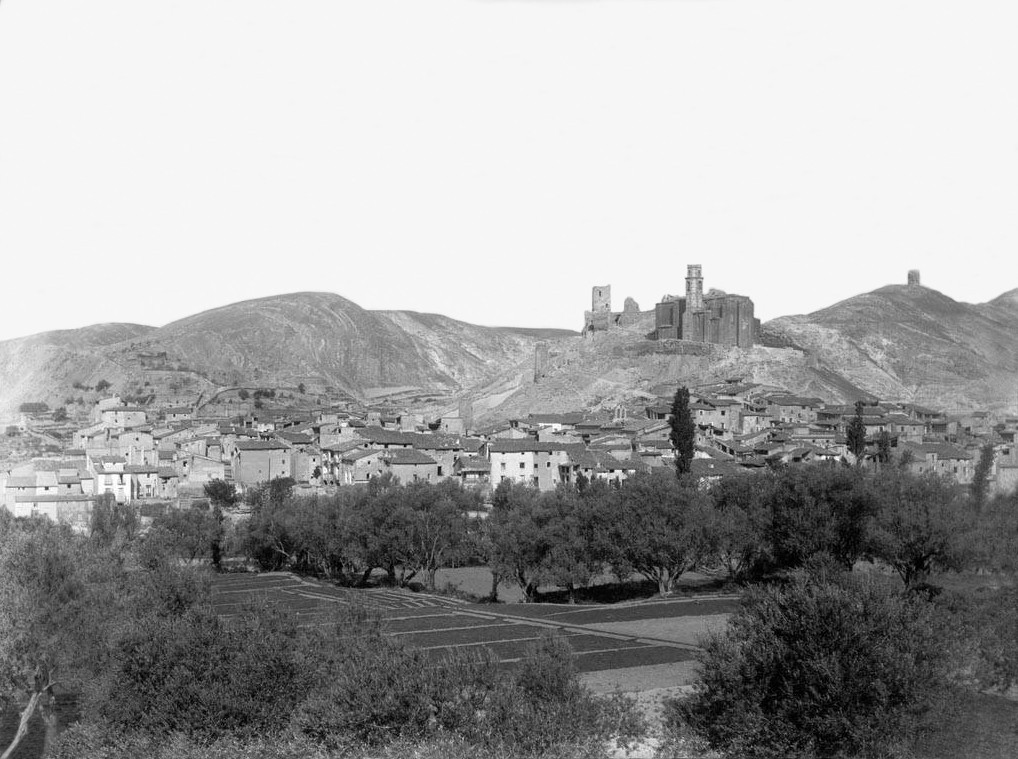 Imatge